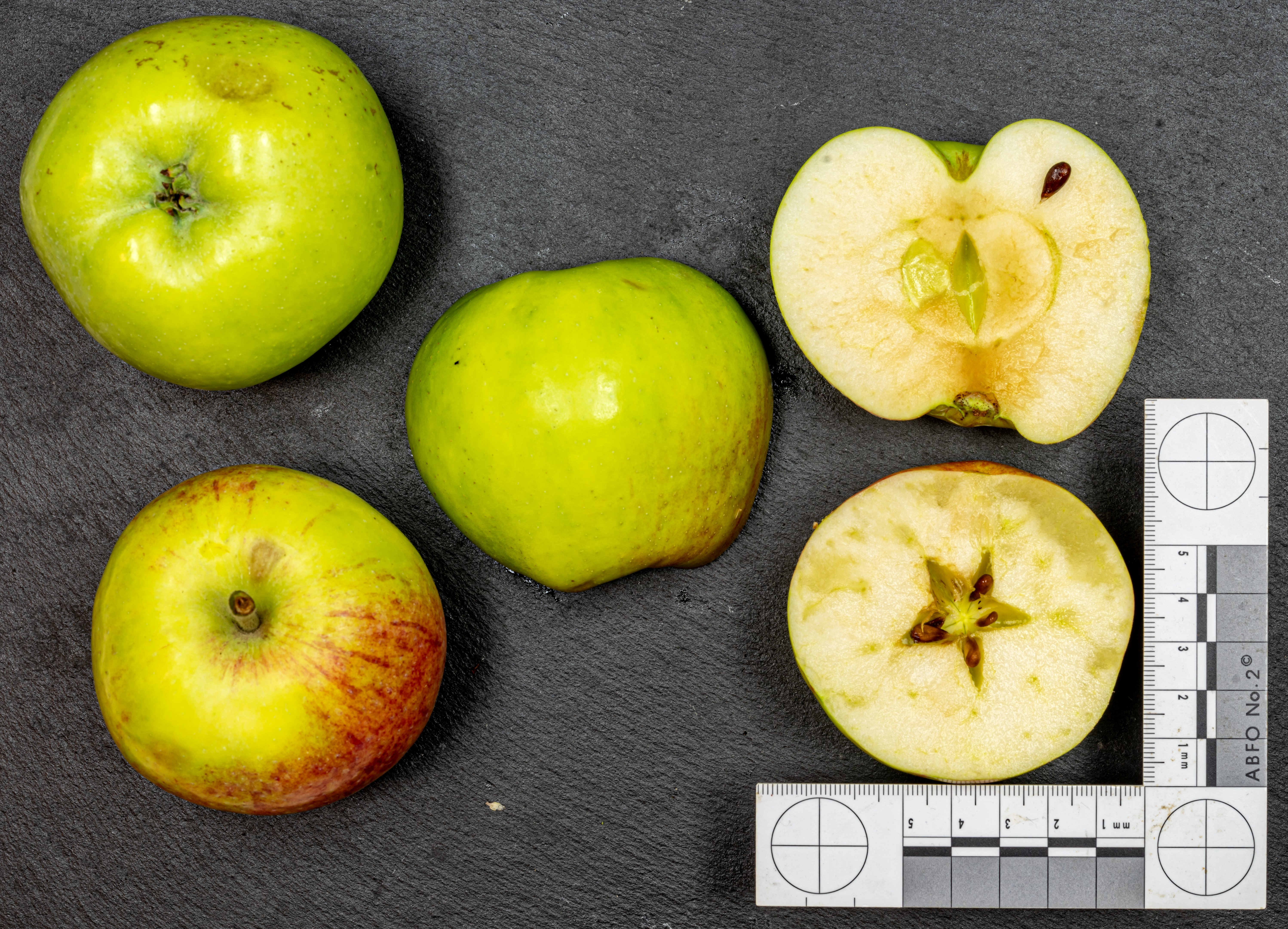 Äpfelsorte: Gravensteiner Die Früchte - jeweils 5 pro Sorte - wurden mir vom Obsthof Drechsle netterweise kostenlos für die Wikipedia Photographien zur Verfügung gestellt´. Vielen Dank dafür.